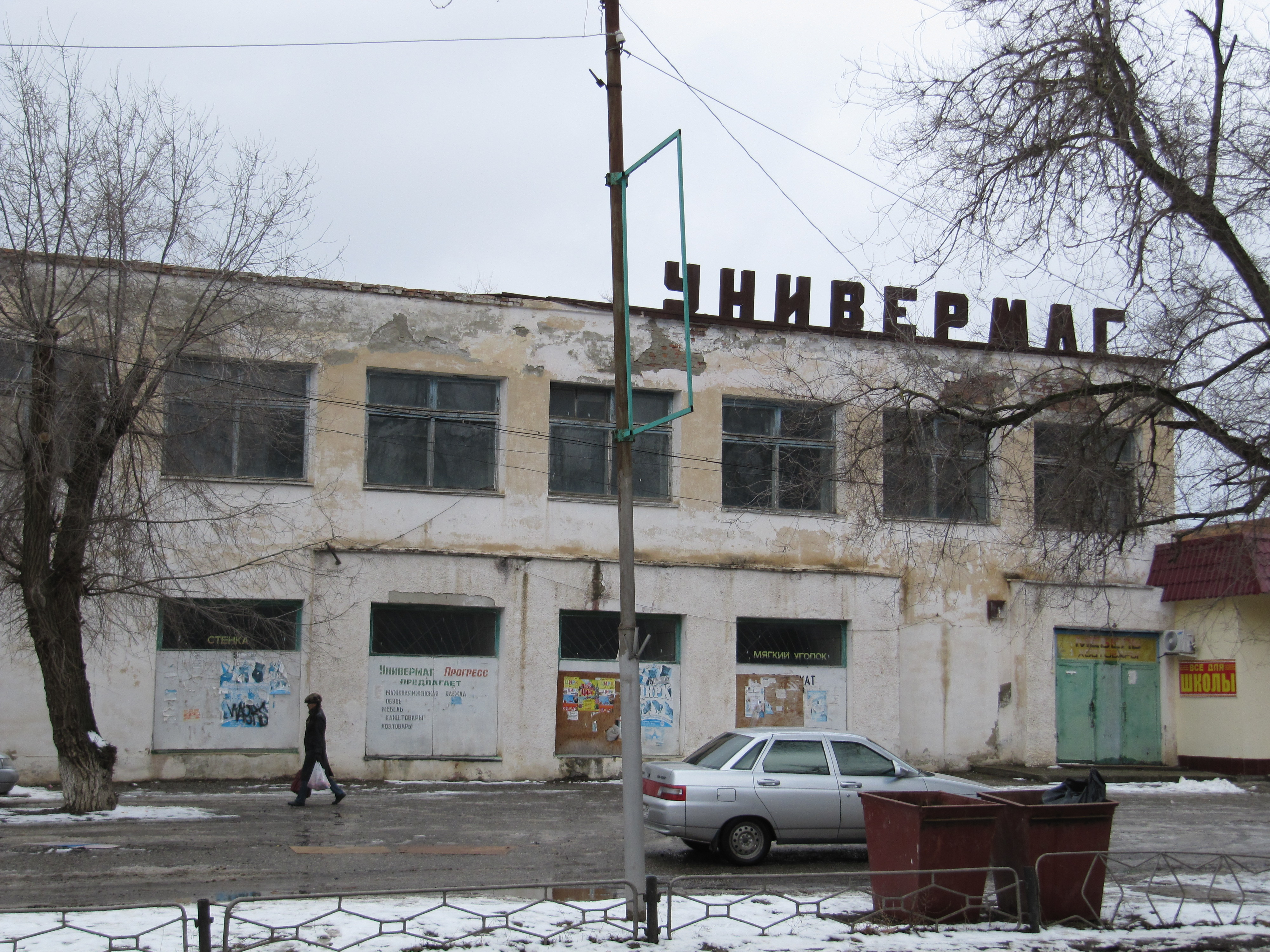 Универмаг. Городовиковск. Калмыкия